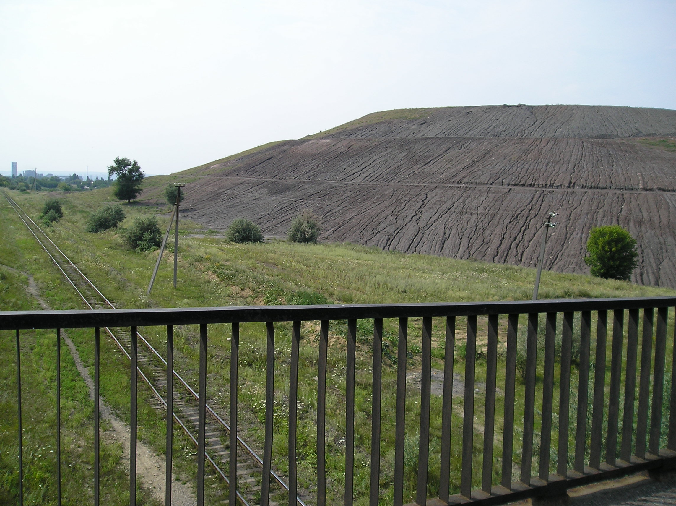 Irmino mine's terricone